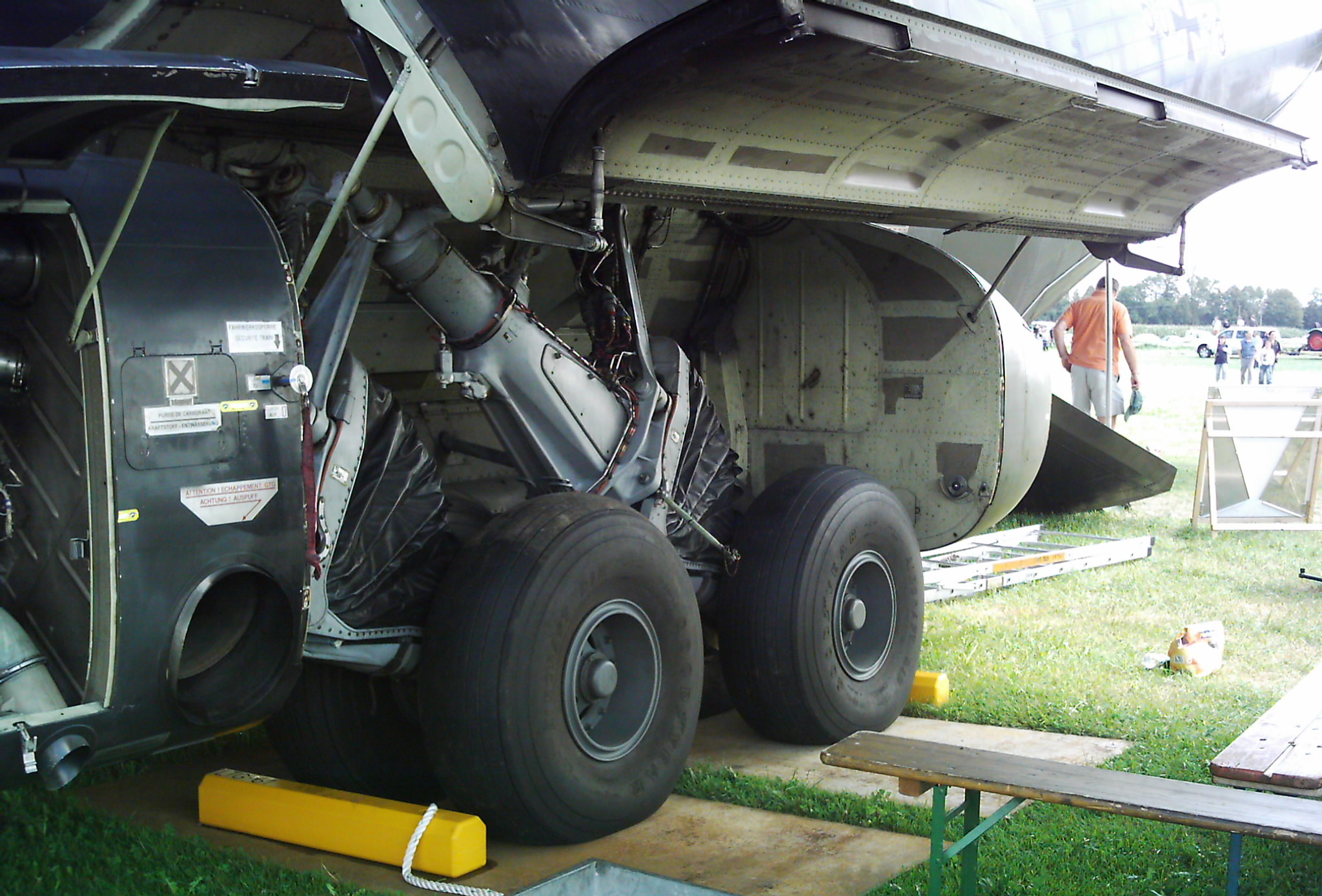 C-160 Transall Flugplatz Tannheim, Fahrwerk von Liebherr